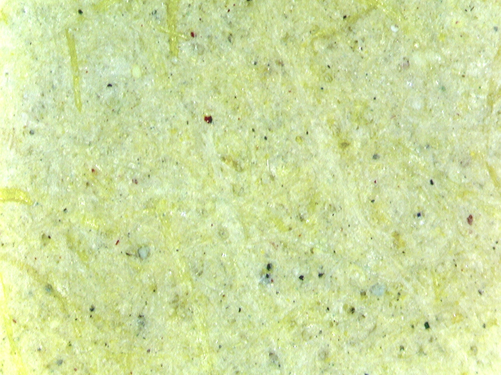 Löschpapier aus einem Schülerheft mit einer 200fachen Vergrößerung aufgenommen